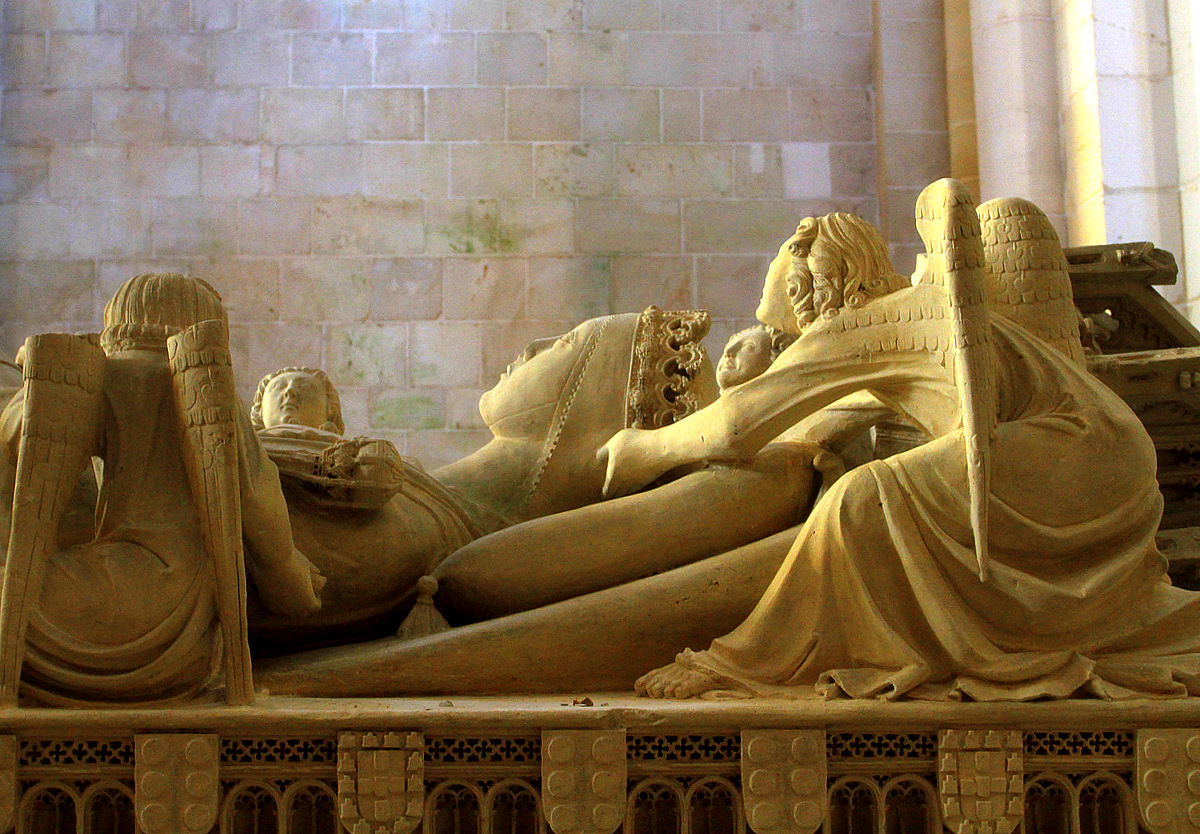 Túmulo de D. Inês de Castro em Alcobaça This file was uploaded for Wiki Loves Monuments in Portugal with the unique identifier 70185.